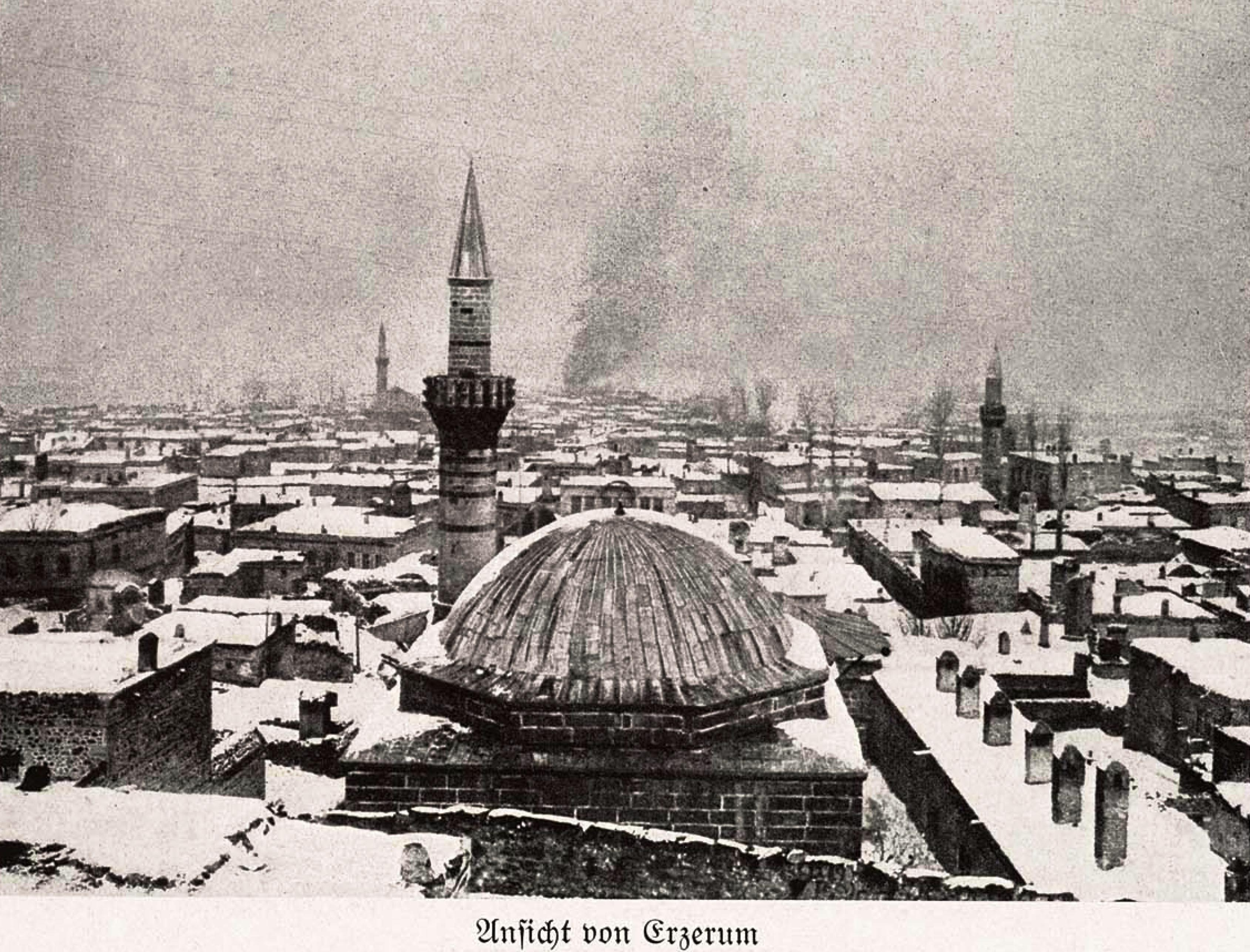 Die Kaukasusfront